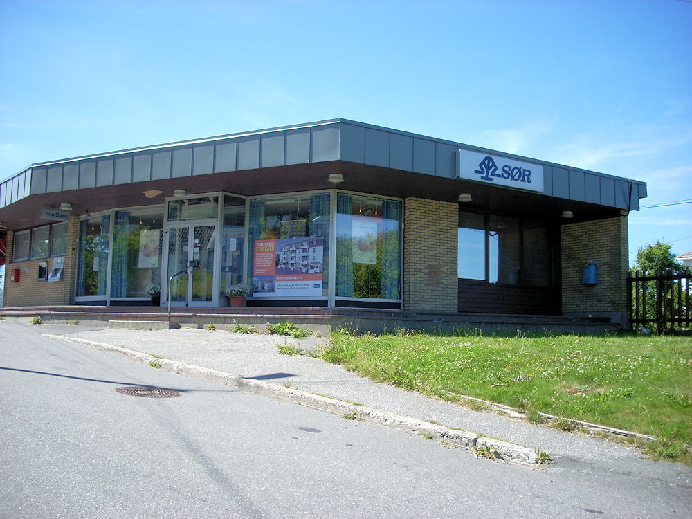 Sparebankens sørs filial på Eydehavn, Arendal, Norge